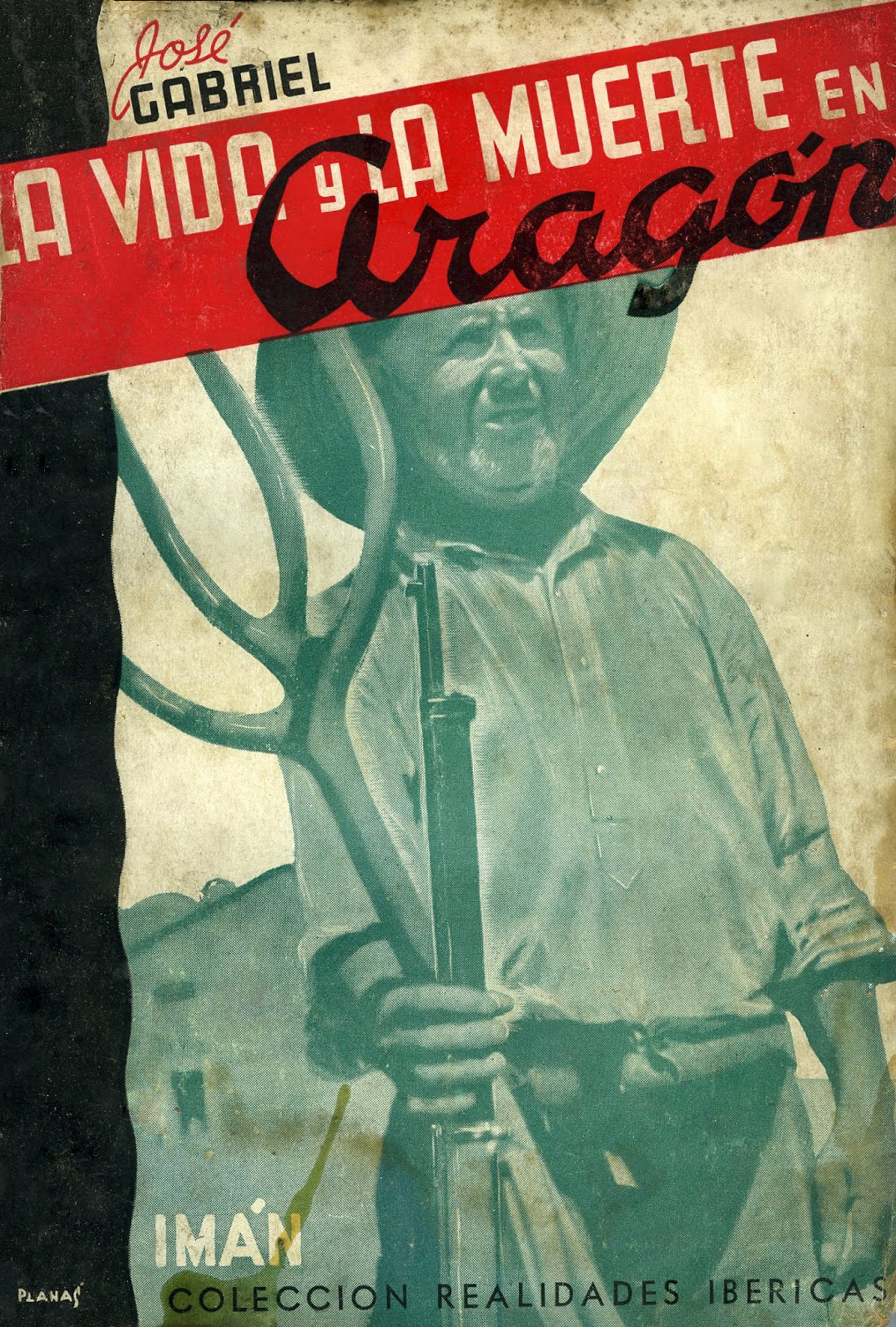 Tapa del libro "La vida y la muerte en Aragón" de José Gabriel (Buenos Aires, 1938).